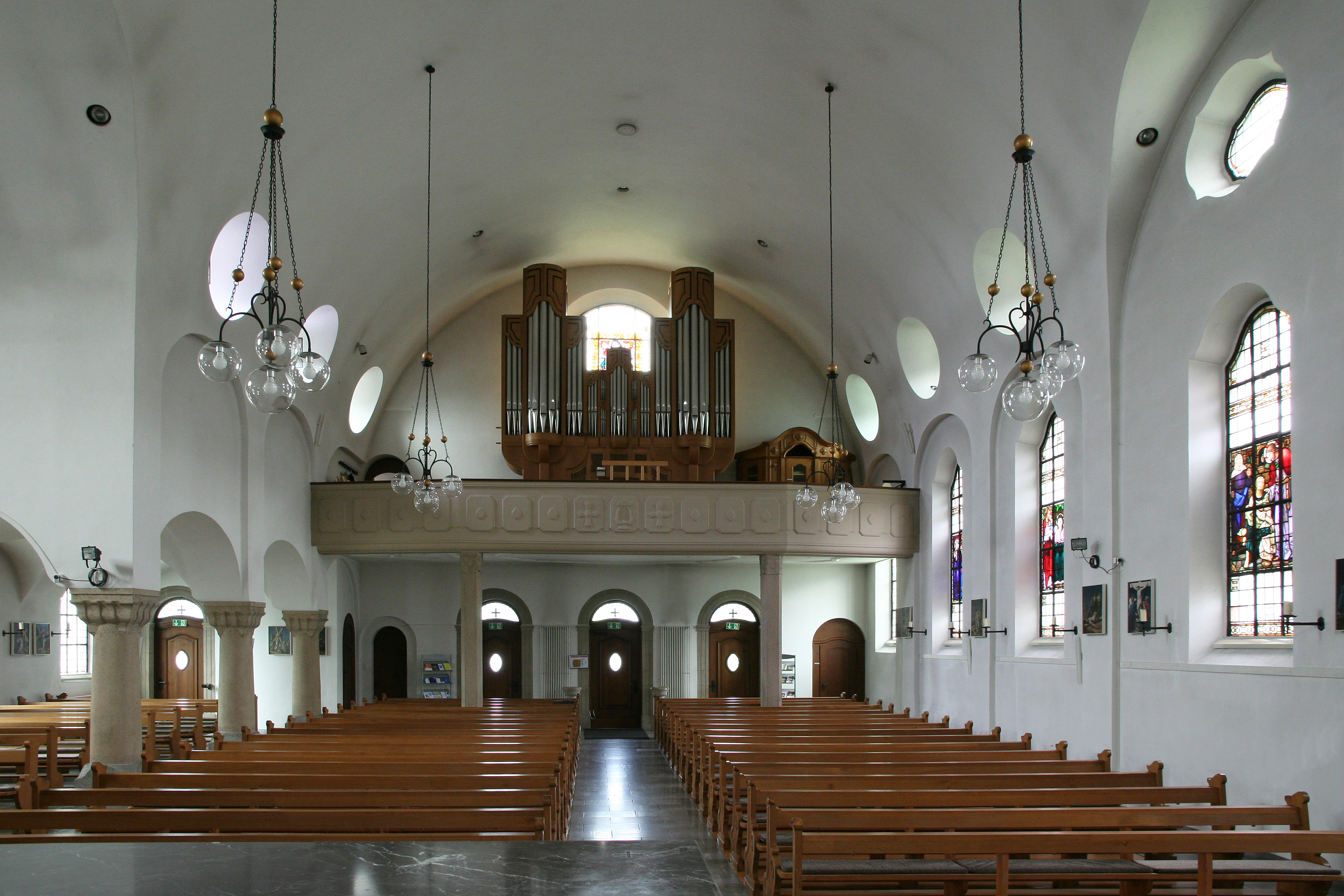 Römisch-katholische Pfarrkirche Richterswil, Empore